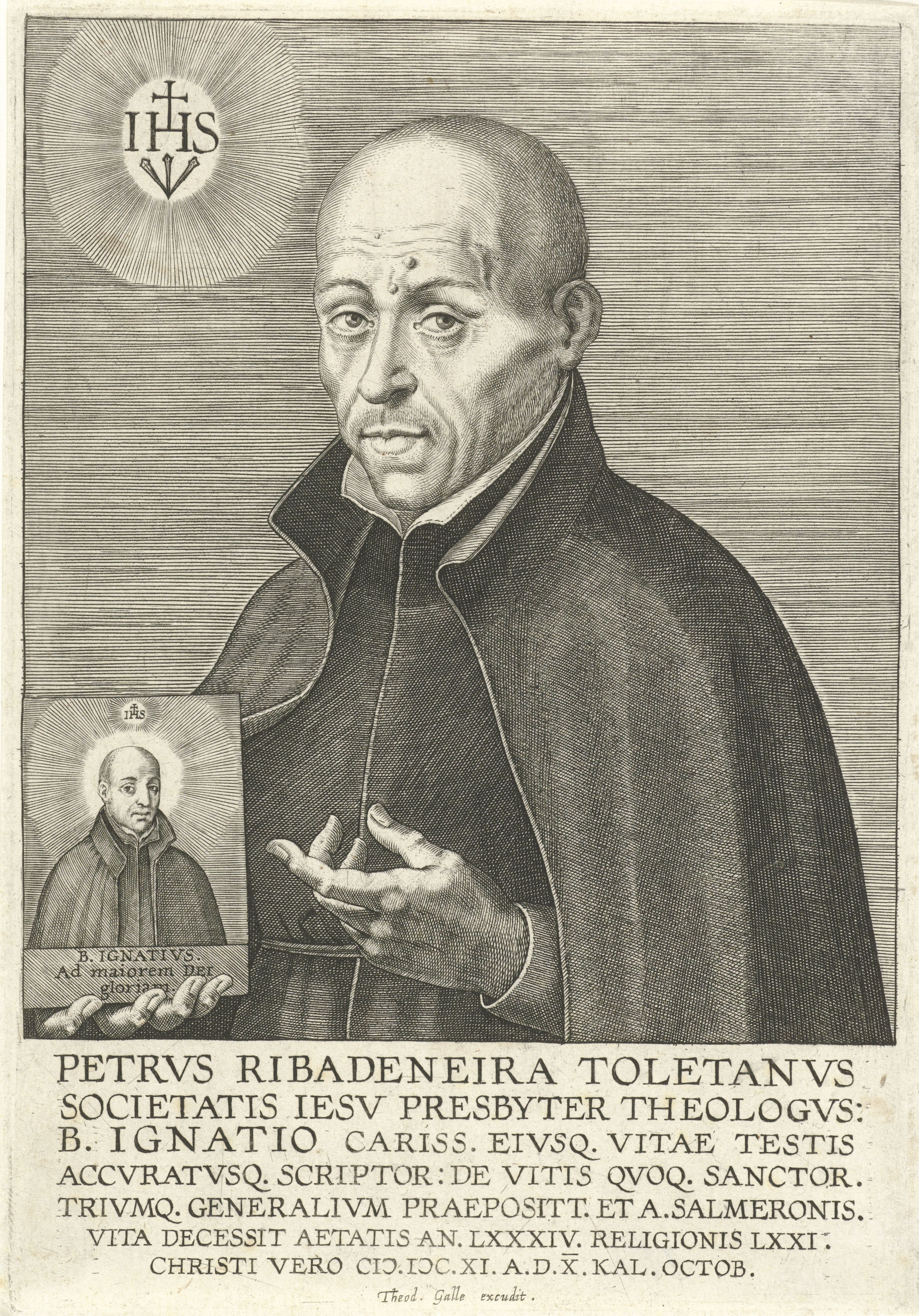 IdentificatieTitel(s): Portret van Petrus RibadeneiraPetrvs Ribadeneira Toletanvs (titel op object)Objecttype: prent Objectnummer: RP-P-OB-6845Catalogusreferentie: Hollstein Dutch-ad 433aOpschriften / Merken: verzamelaarsmerk, verso midden, gestempeld: Lugt 2228Omschrijving: Portret van Petrus Ribadineira, een Jezuïet en schrijver. Buste naar rechts. Hij draagt een soutane. In zijn hand het portret van de heilige Ignatius de Loyola, de oprichter van de Jezuïetenorde. Linksboven het monogram IHS. De prent heeft een Latijns onderschrift.VervaardigingVervaardiger: prentmaker: Theodoor Galle (mogelijk)uitgever: Theodoor Galle (vermeld op object)Plaats vervaardiging: AntwerpenDatering: 1610Fysieke kenmerken: gravureMateriaal: papier Techniek: graveren (drukprocedé)Afmetingen: plaatrand: b 122 mm × h 176 mmOnderwerpWat: the founder of the Jesuit Order, Ignatius of Loyola; possible attributes: book (with 'ad majorem Dei gloriam'), demon, dragon under feet, flames, flaming heart, globe, IHS monogram, skull (with crown), tears in eyes, torchIHS ('Iesus Hominum Salvator') ~ symbol of ChristWie: Petrus RibadineiraVerwerving en rechtenVerwerving: onbekendCopyright: Publiek domein